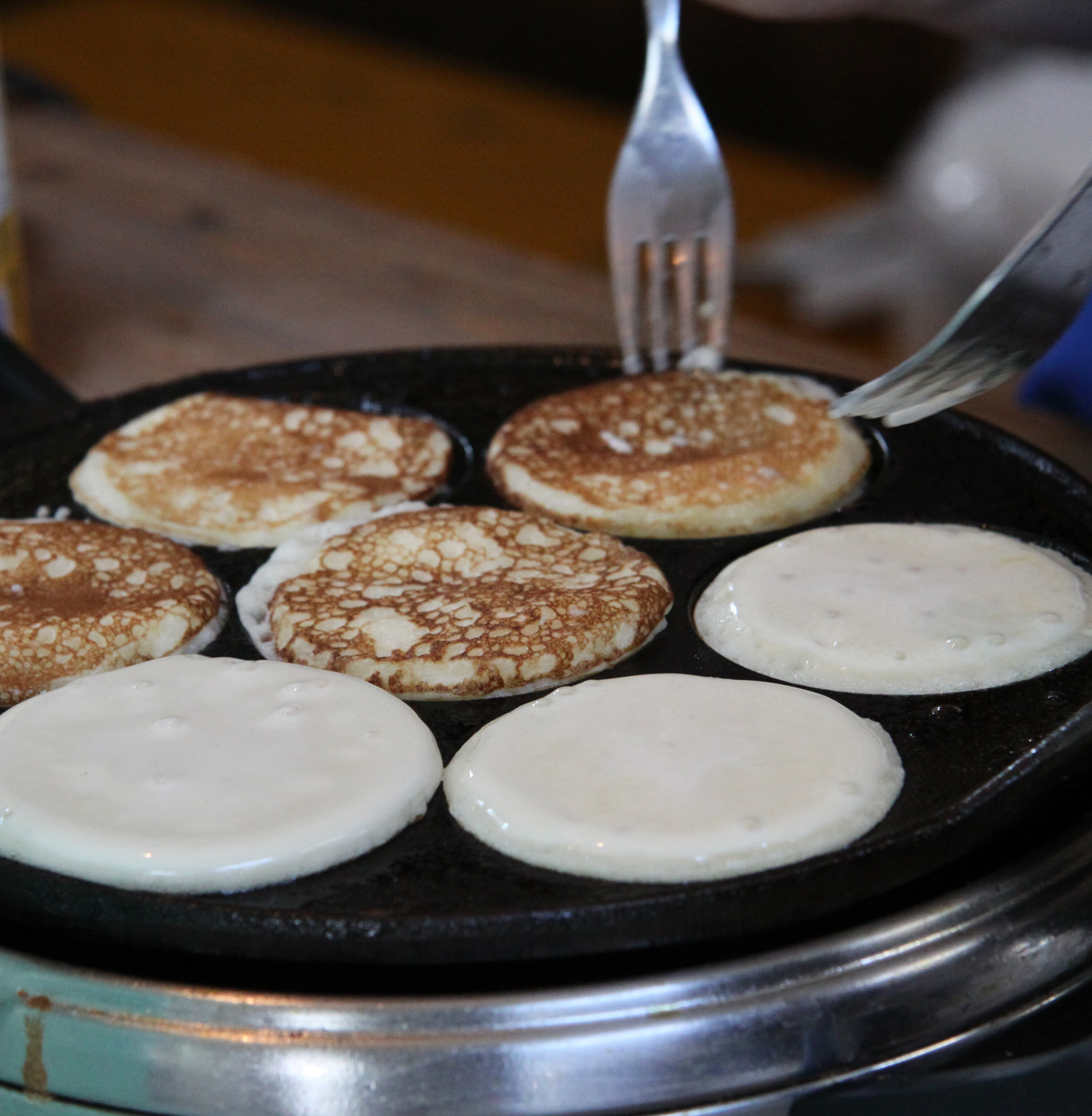 Liwanzen, Böhmisches Gebäck